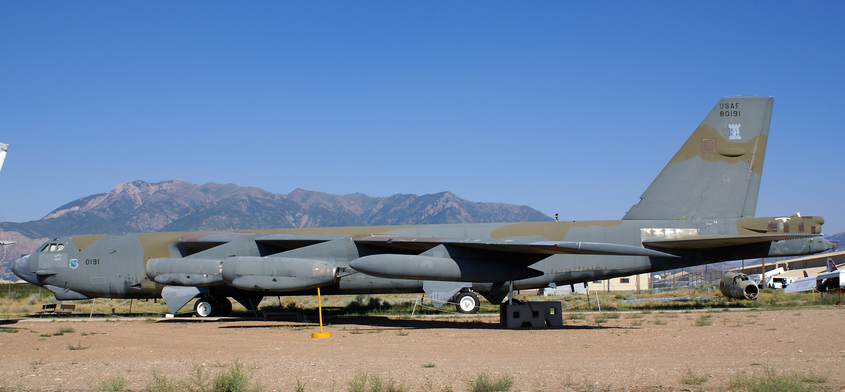 58-0191 Boeing B52G US AIR FORCE Ogden - Hill AFB (HIF / KHIF) USA - Utah HILL AEROSPACE MUSEUM